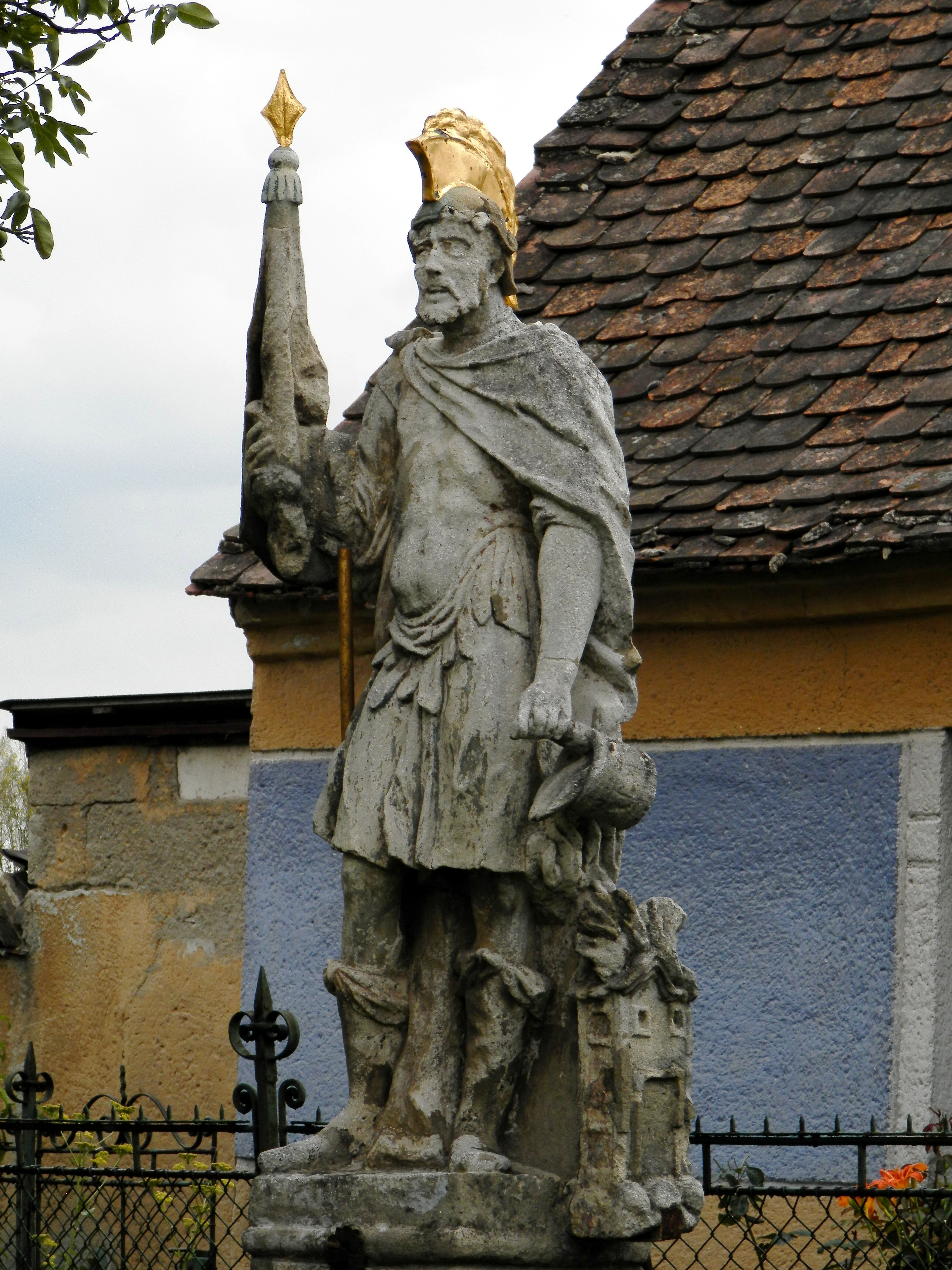 Socha sv. Floriána (Konice), při čp. 33, Konice